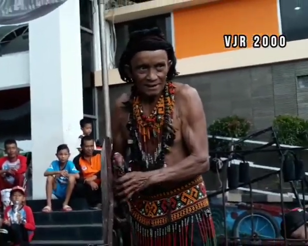 gambar ini adalah screenshot dari Chanel YouTube VJR 2000 dengan keterangan lisensi Creative Commons (dapat digunakan kembali)